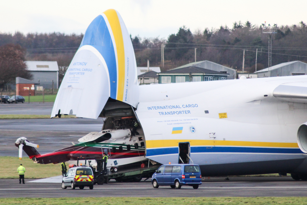 A7-MBN Sikorsky S-92 being unloaded from UR-82008